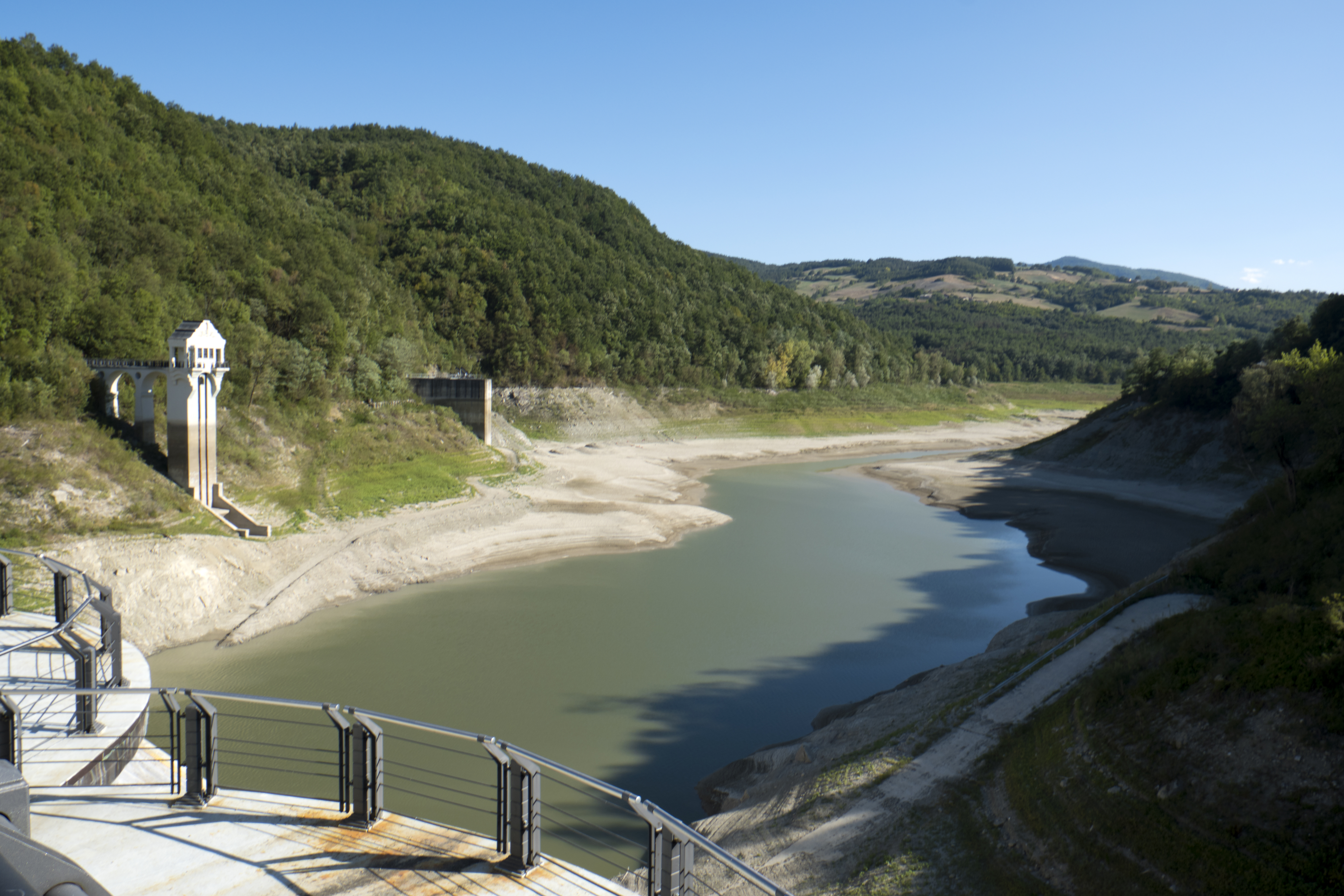 Diga del Molato This is a photo of a monument which is part of cultural heritage of Italy.